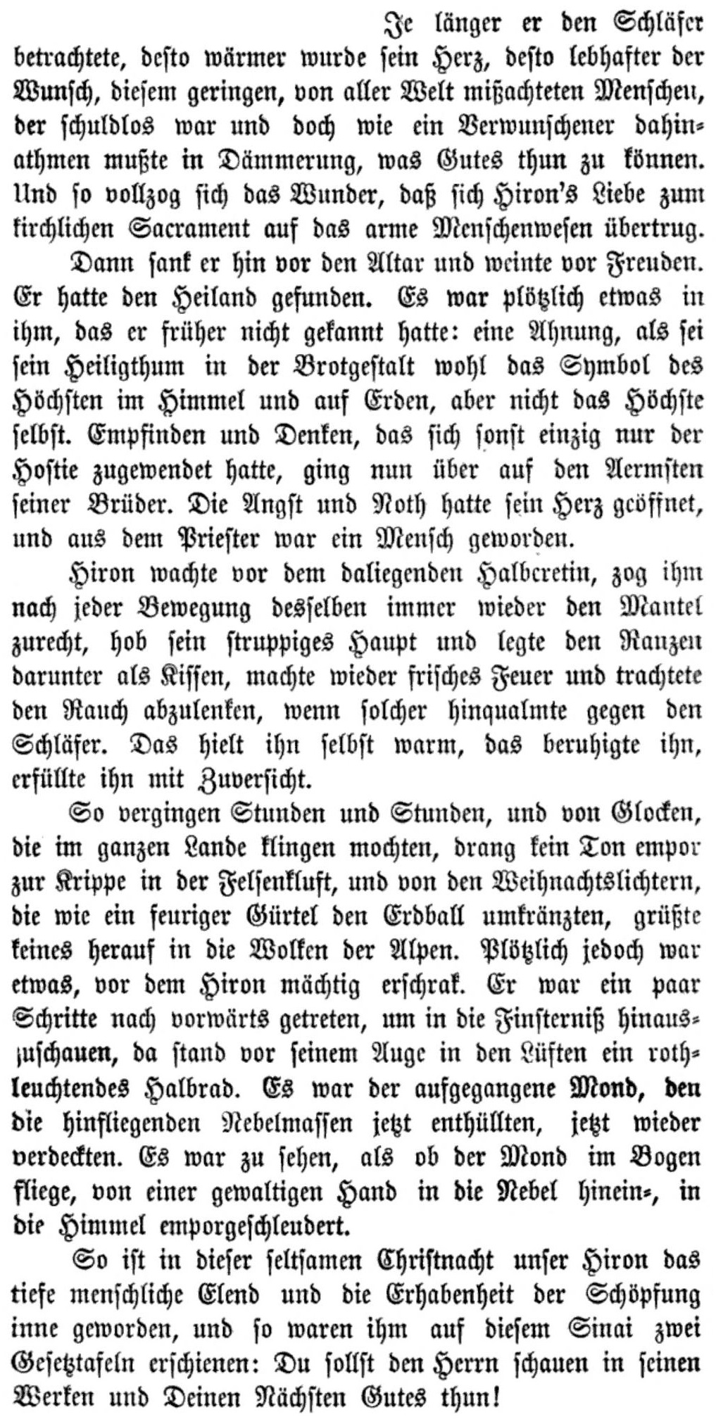 Schlüsselpassage aus Peter Roseggers Erzählung Empor zu Gott